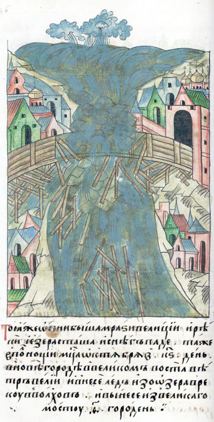 ЛИЦЕВОЙ ЛЕТОПИСНЫЙ СВОД: Той же осенью были морозы великие, и реки, и озера замерзли, и снег выпал; также в полночь, месяца октября в 26-й день, в Новгороде Великом поднялся ветер великий, и понес лед из озера в реку Волхов, и вынес из Великого моста 9 устоев.